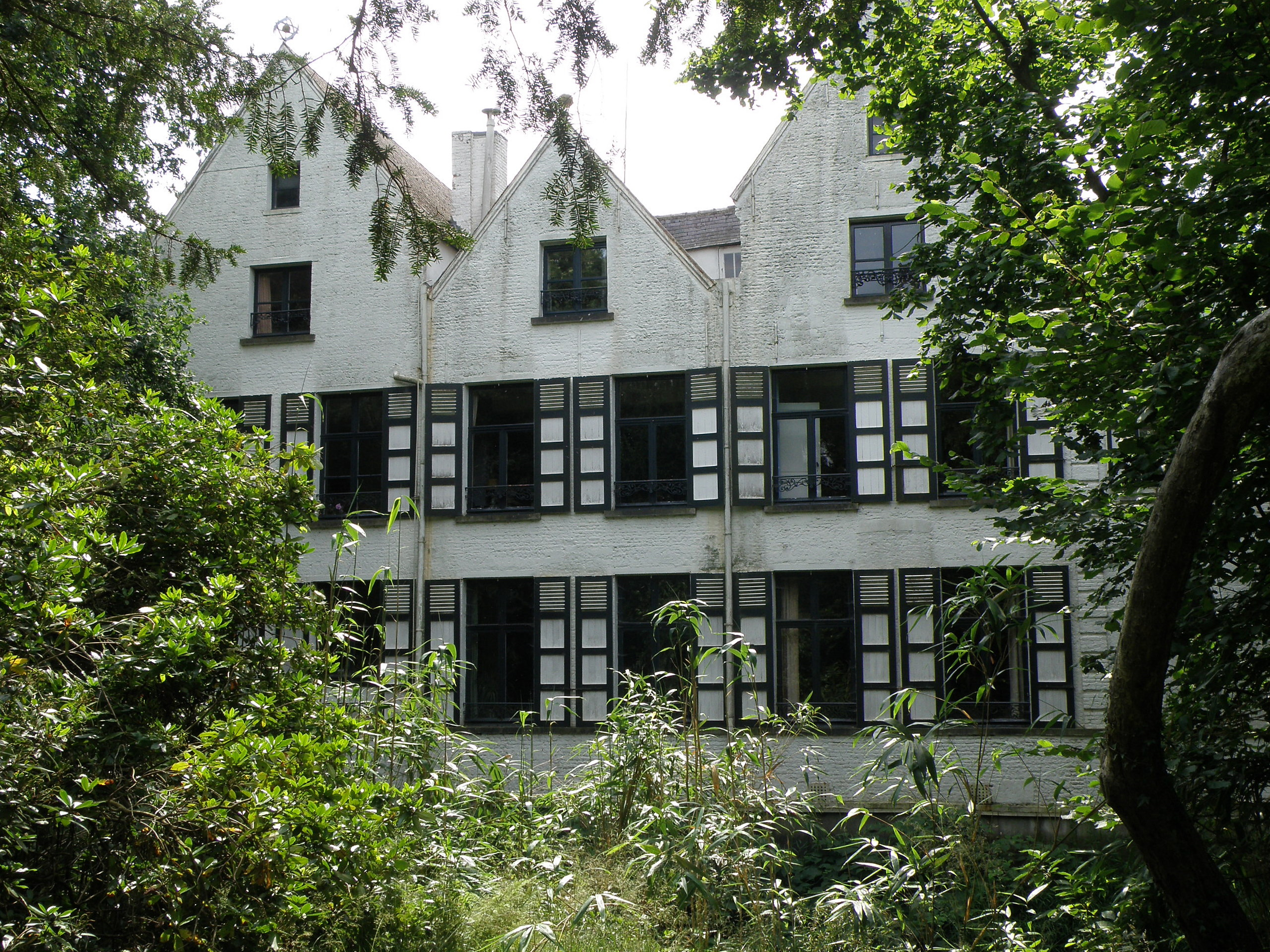 Edegem (banlieue sud d'Anvers). Manoir Mussenborg ou Missenborg (Missembourg dans l'œuvre de Marie Gevers), façade nord.